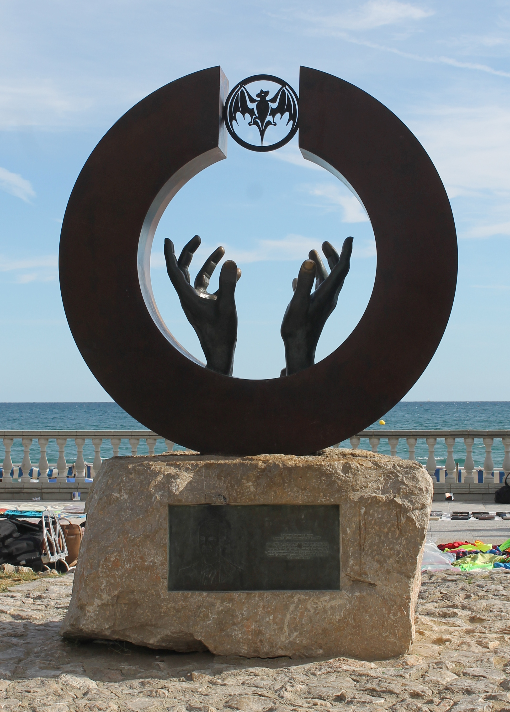 Facundo Bacardi i Masso sculpture in Sitges